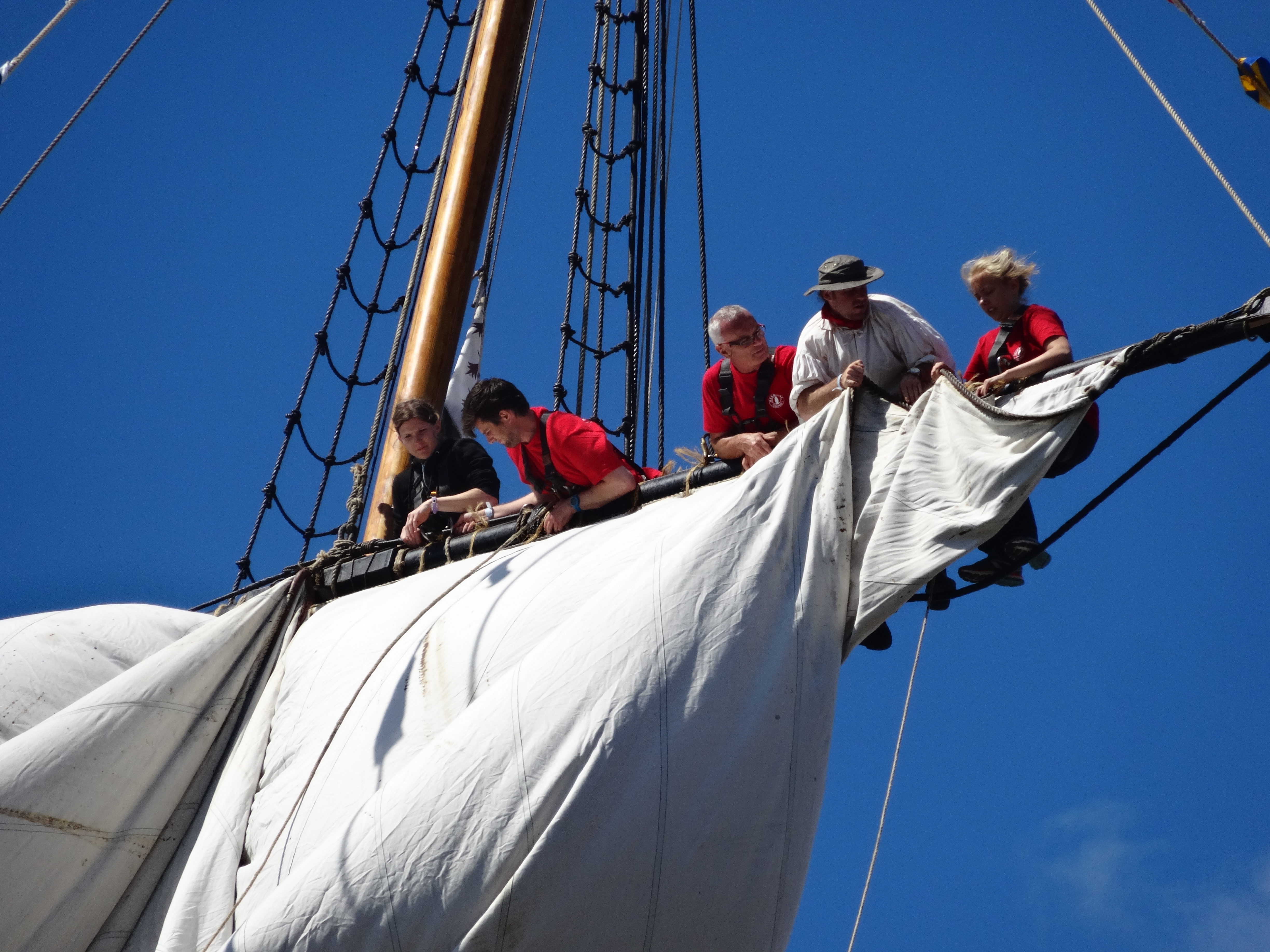 Gabiers de la frégate l'Hermione lors des Fêtes maritimes de "Brest 2016". Brest, Finistère, France